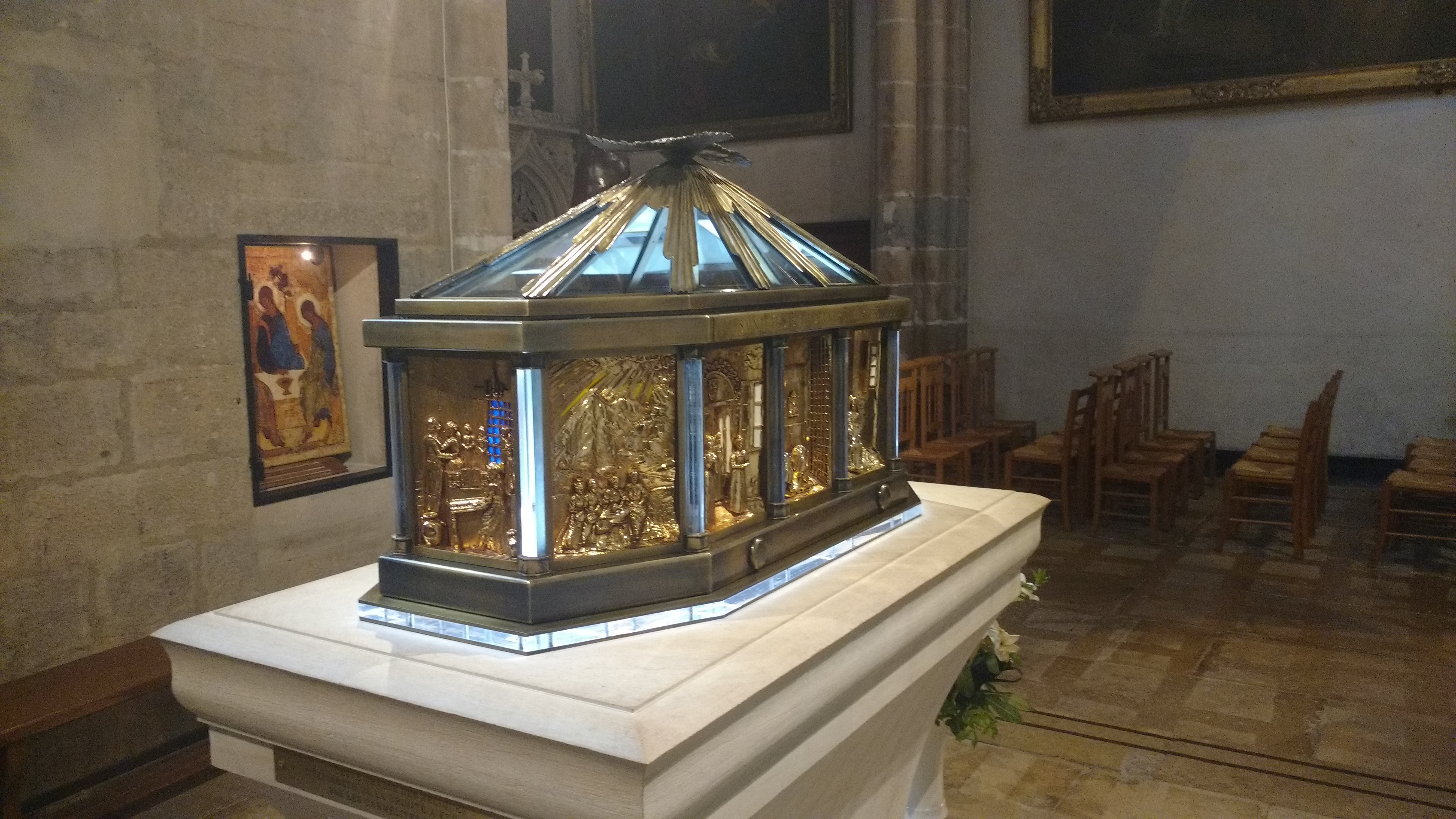 Châsse de sainte Élisabeth de la Trinité, église saint Michel de Dijon